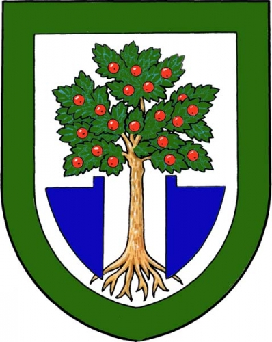 Znak, Klopina, okres Šumperk